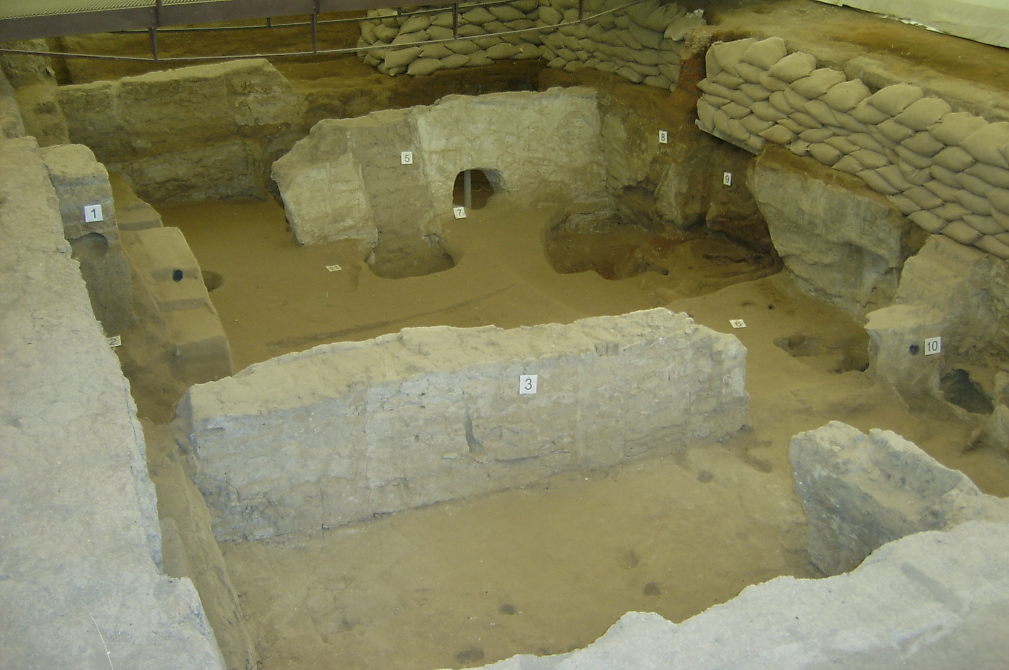 Çatal Hüyük excavations